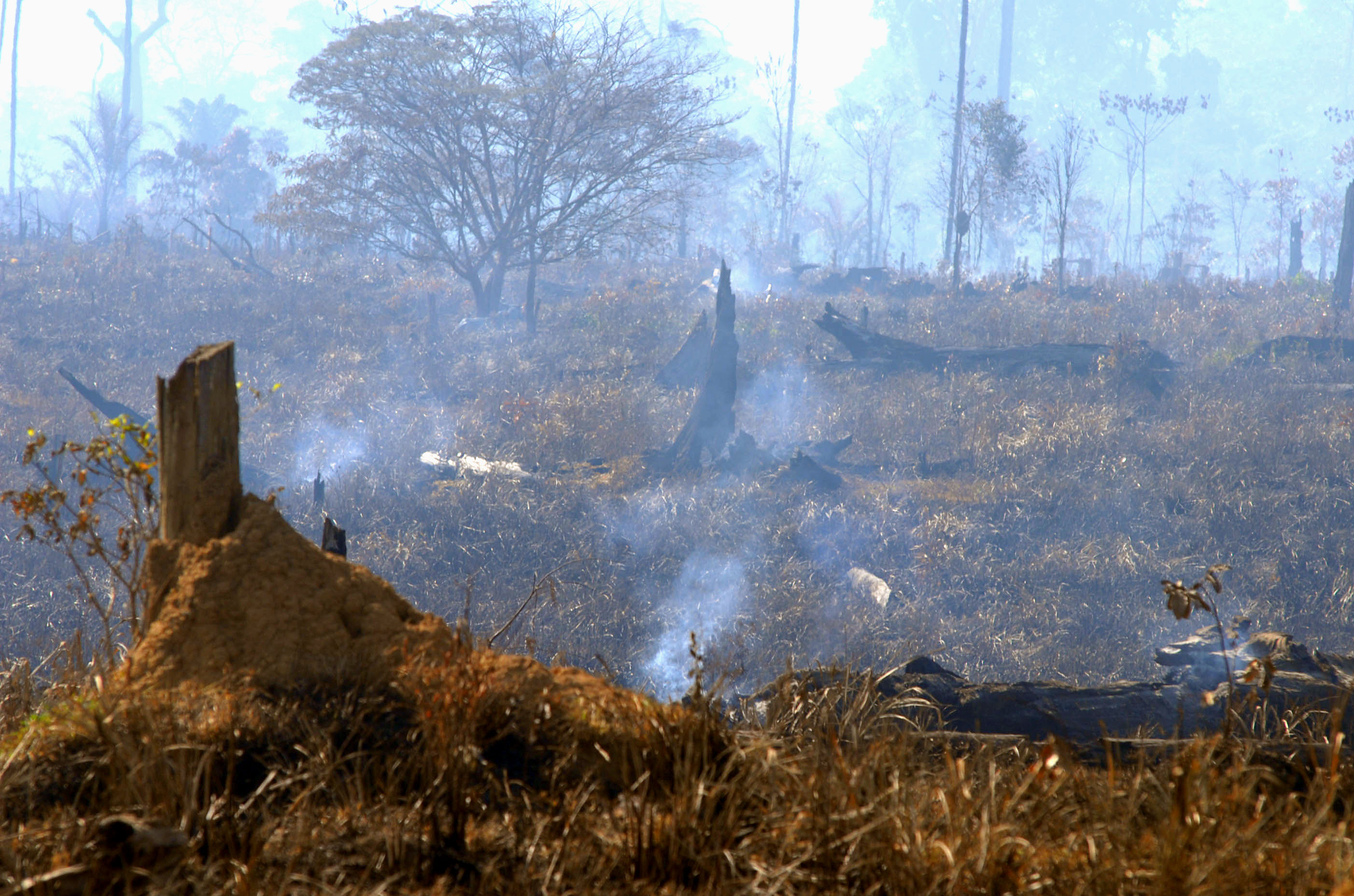 Queimadas que os pecuaristas fazem para roçar e limpar os pastos, na estrada no município de São Félix